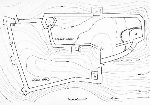 Тлоцрт Соко Града над Пливом код Шипова.